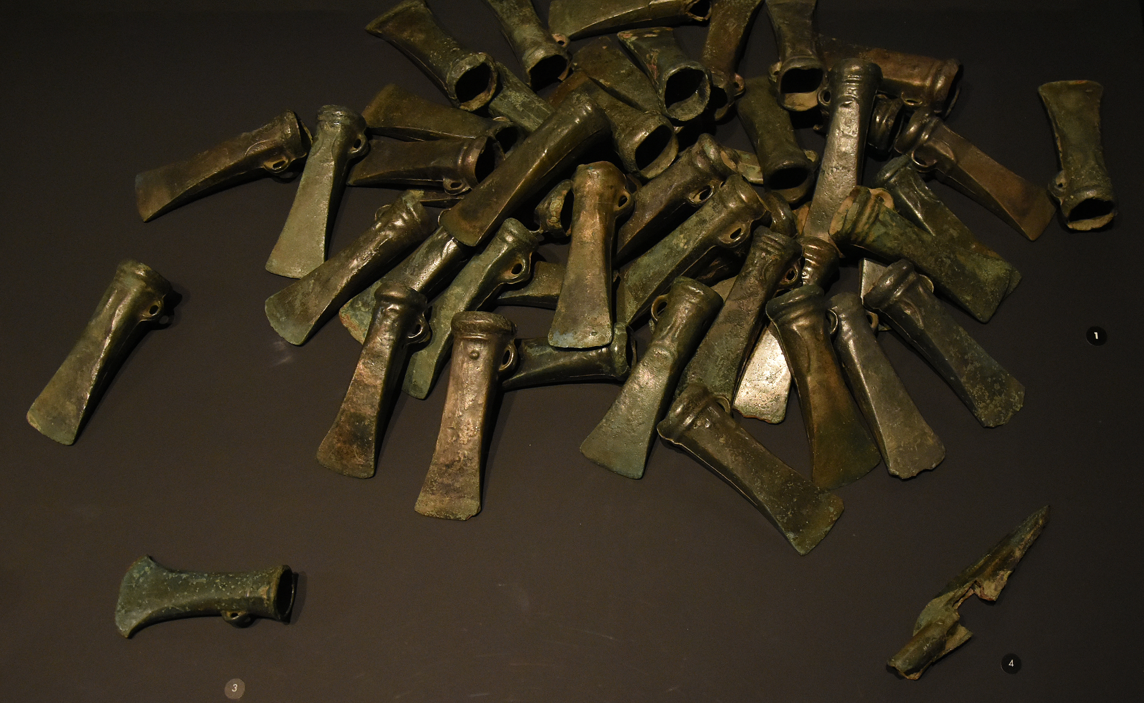 Bronsdepot van Heppeneert - 8e eeuw v.Chr. - Gallo-Romeins Museum (Tongeren) 24-03-2018